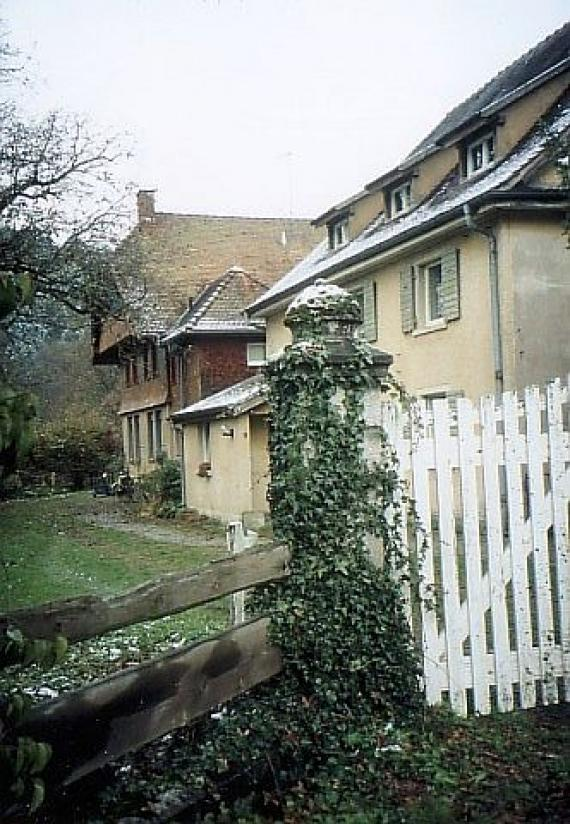 Außenaufnahme des ehemaligen Hachschara-Zentrums Markenhof bei Kirchzarten